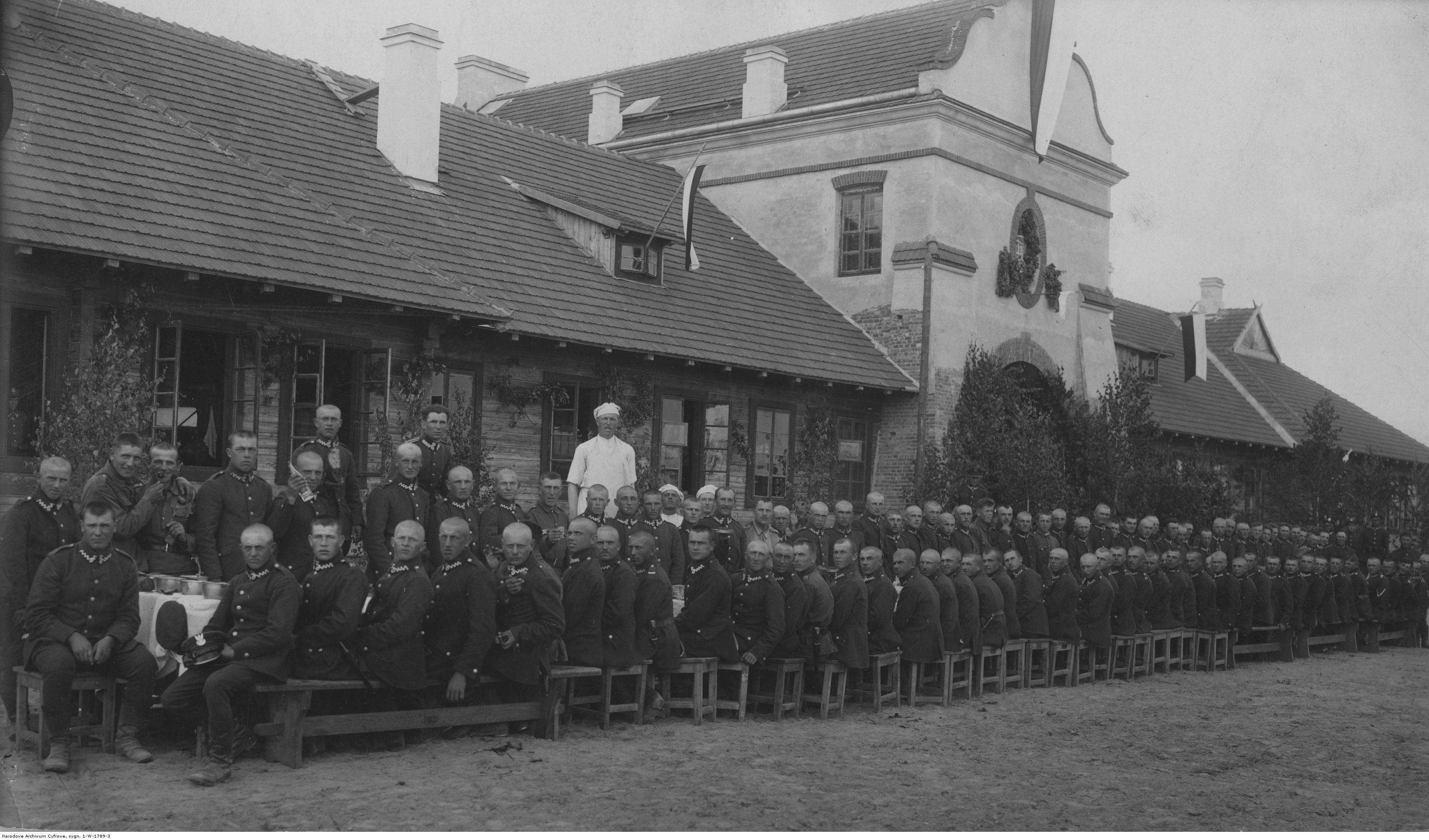 Święto żołnierza polskiego w 17 Batalionie Korpusu Ochrony Pogranicza "Dawidgródek". Obiad dla żołnierzy 17 Batalionu KOP. Ilustrowany Kurier Codzienny - Archiwum Ilustracji.